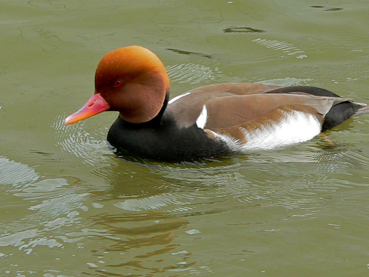 Parc Phoenix, Nice, Alpes-Maritimes, FRANCE